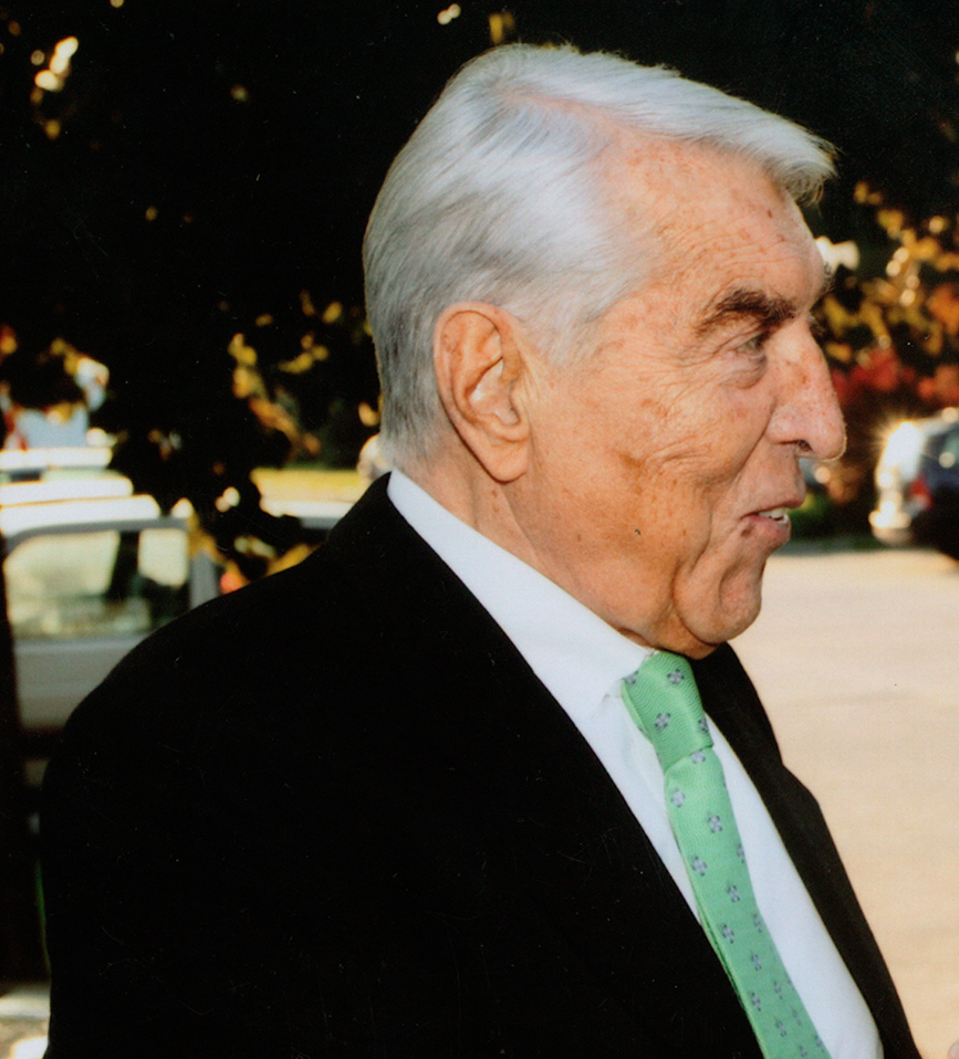 Werner Faymann spricht mit Helmut Zilk. Foto: privat